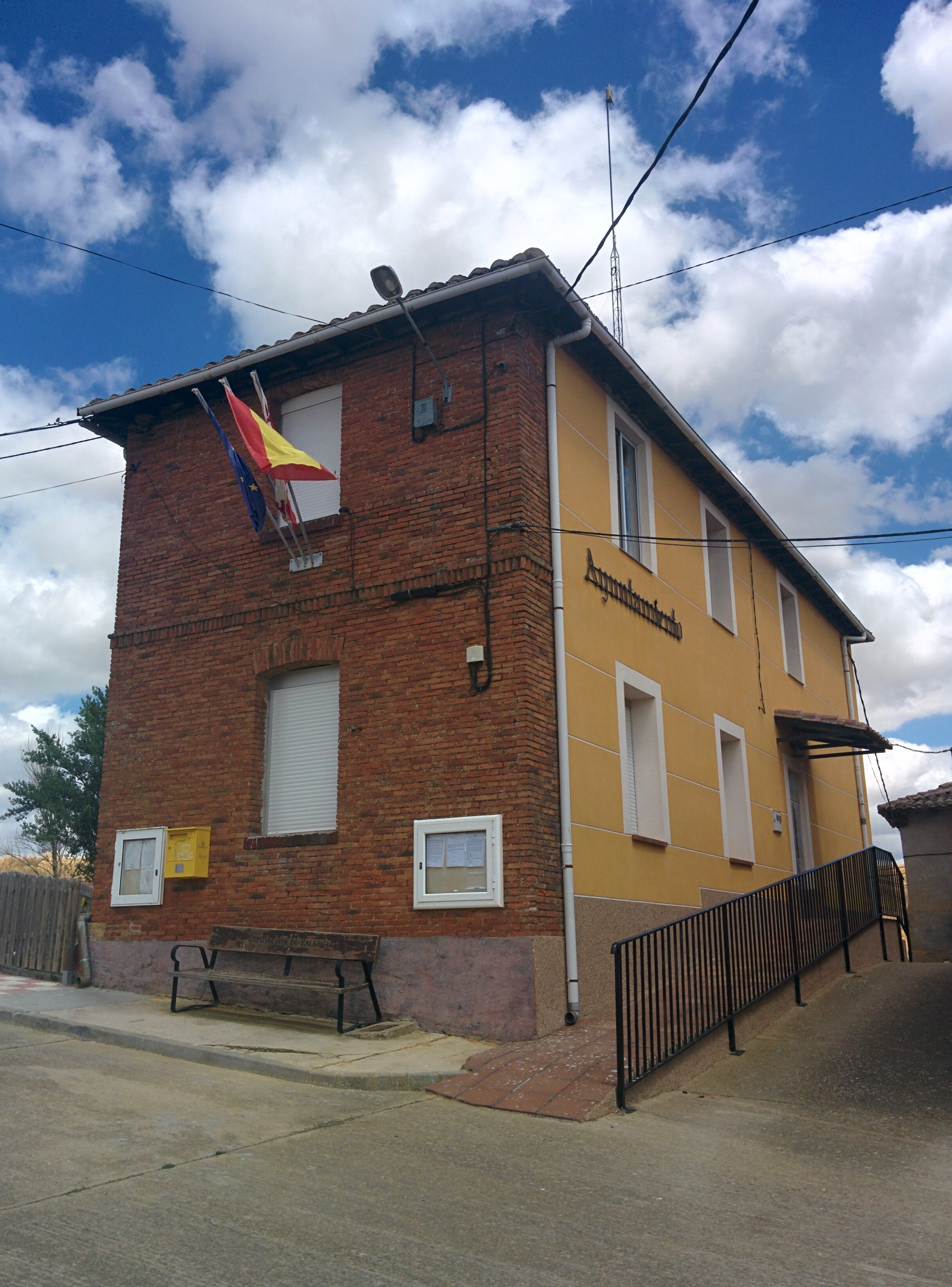 Casa consistorial de Lagartos (Palencia, España).